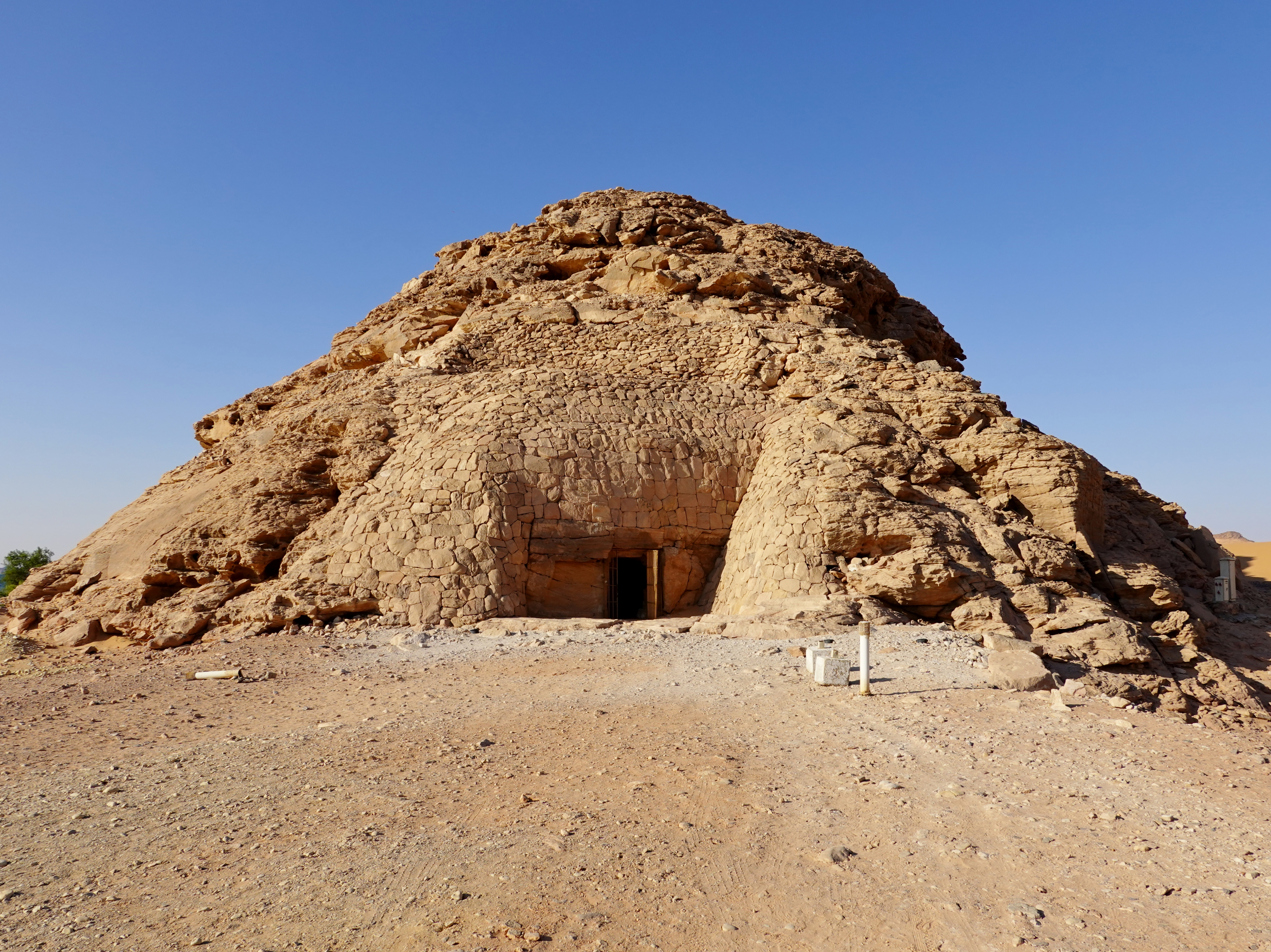 Grab des Pennut am Nassersee, Ägypten